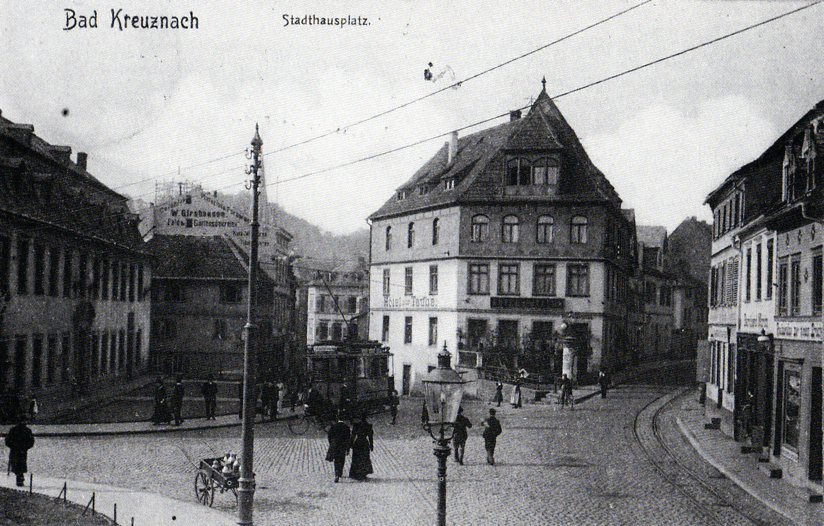 Bad Kreuznach Stadthausvorplatz. Picture postcard, 1906.